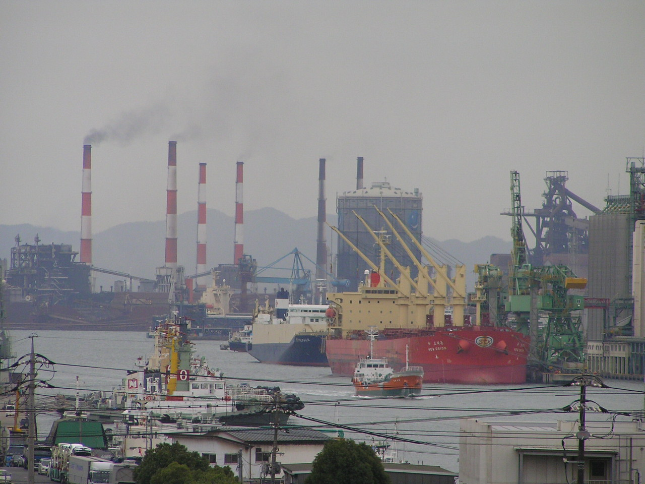 ビル屋上から水島港をのぞむ